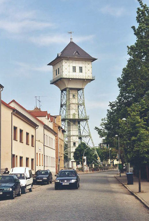 Groitzsch: Blick auf den Wasserturm. Der Turm wurde in Stahlskelettbauweise 1903/04 errichtet. Er erinnert in seiner Form an ein Taubenhaus, ist 45 m hoch und fasst 300 m³ Wasser.